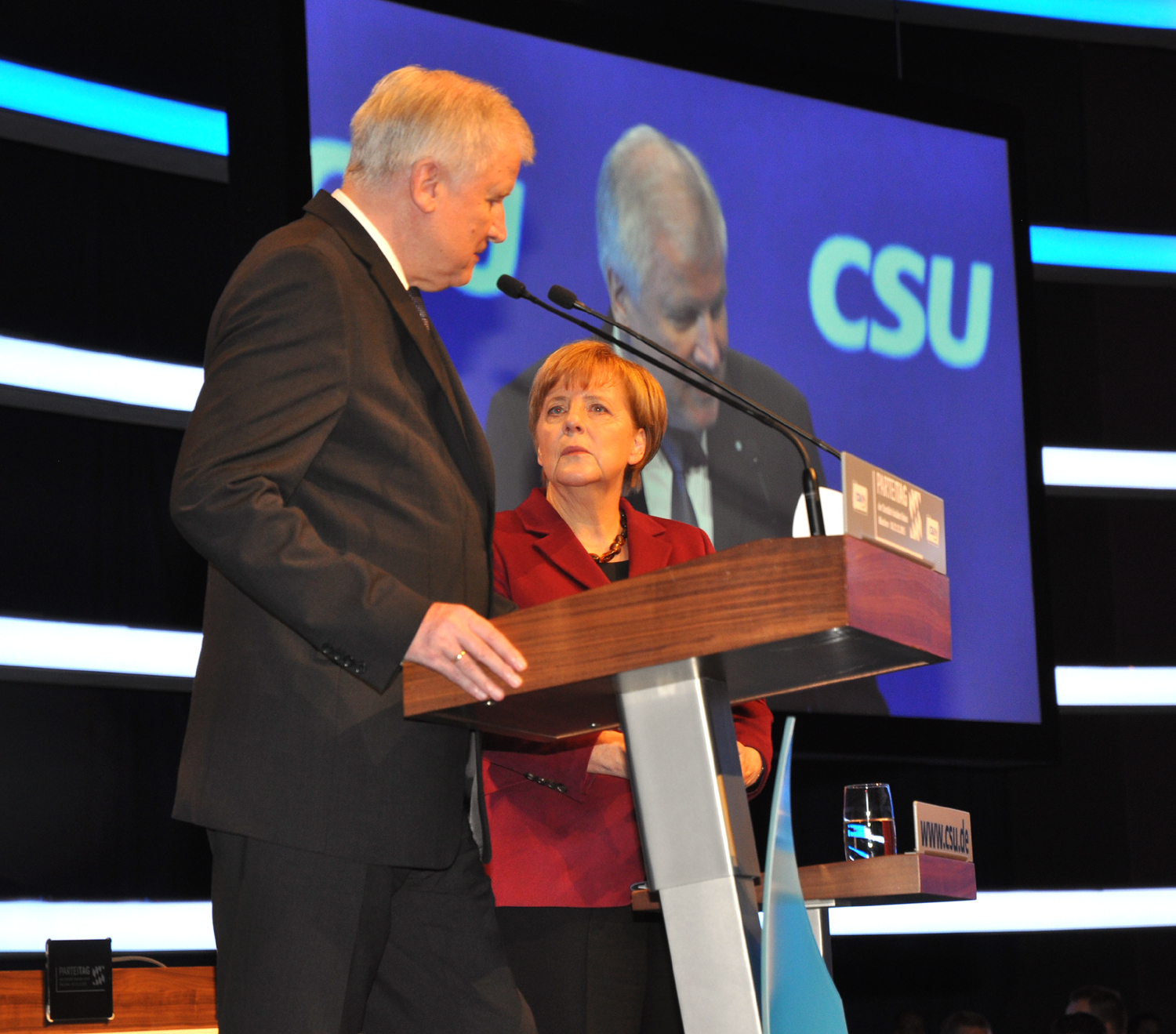 Angela Merkel mit Horst Seehofer auf dem Parteitag der CSU 2015 in München